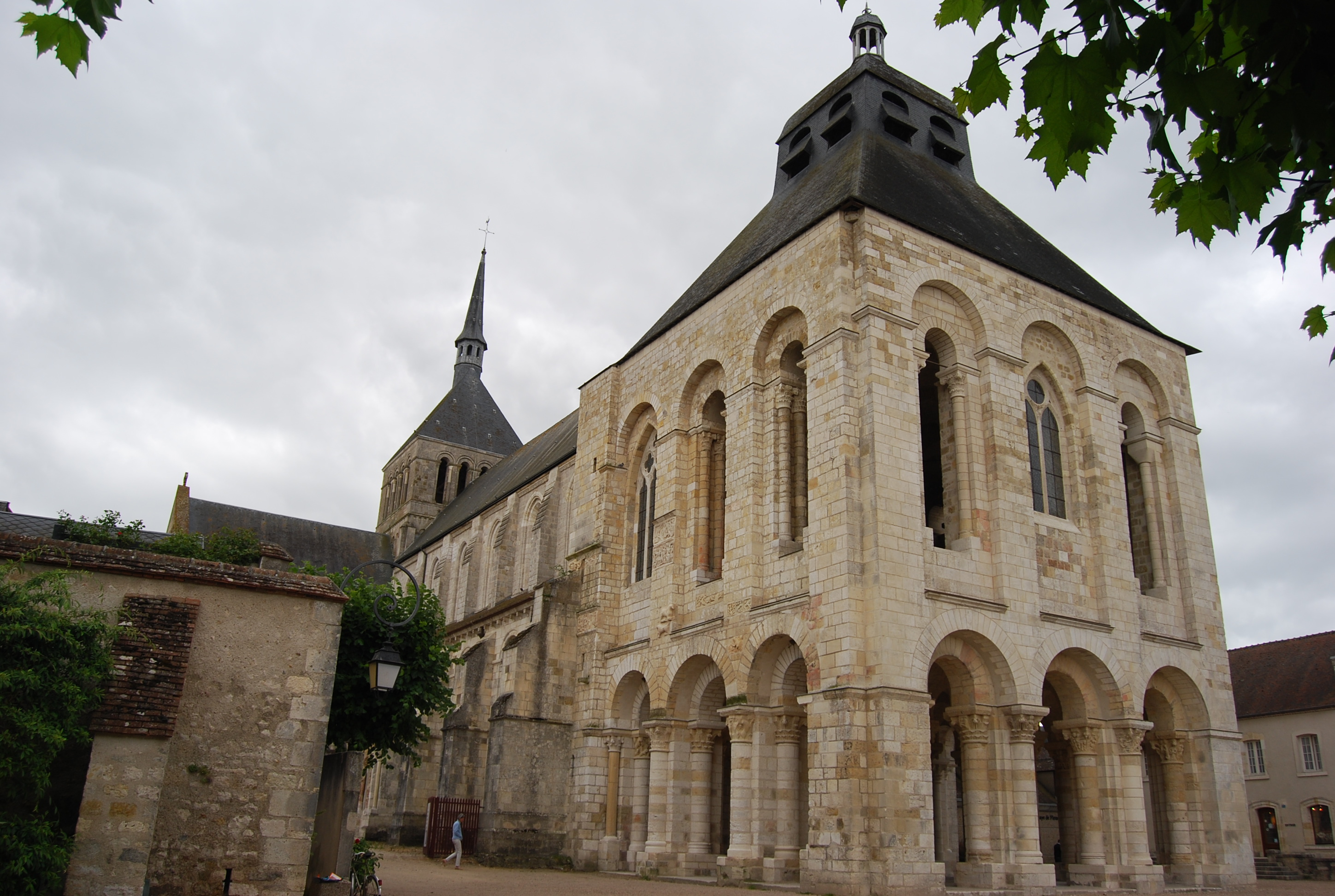 Nartece